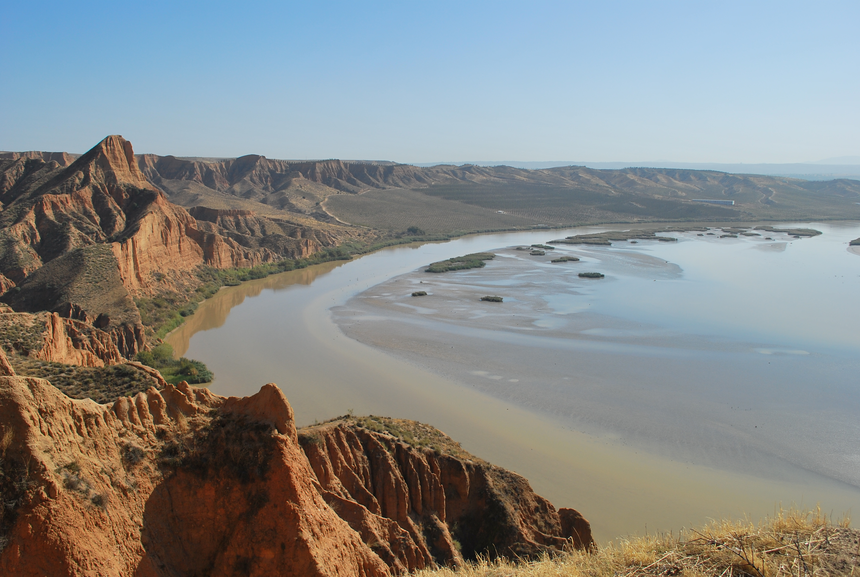 Barrancas de Castrejón, provincia de Toledo, España.